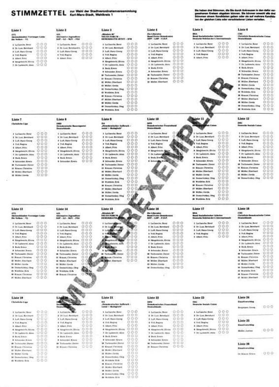 Kommunalwahl, Muster eines Stimmzettels ADN-Repro 7.4.90 Berlin: Muster eines Stimmzettels im Format A2 zur Kommunalwahl am 6.5.1990. Lediglich in kleineren Wahlkreisen mit weniger Kandidaten kann auf ein geringeres Format zurückgegangen werden.